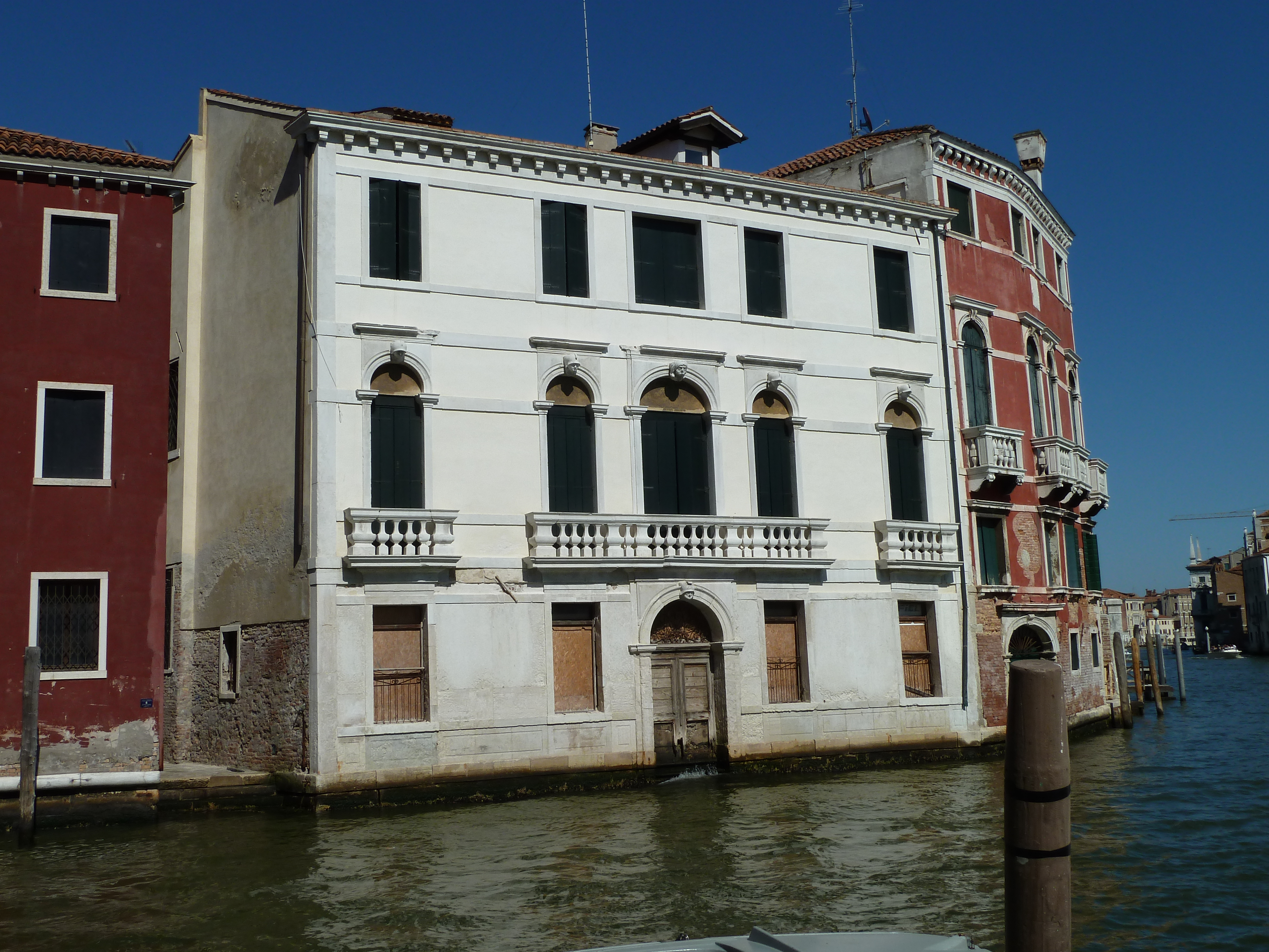 Palazzo Emo (Venice)